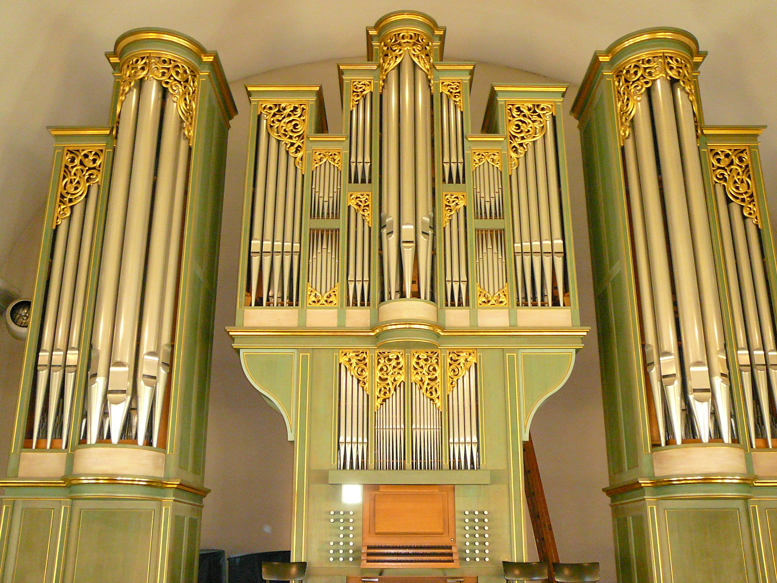 Römisch-katholische Kirche St. Josef Zürich-Industriequartier, Metzler-Orgel